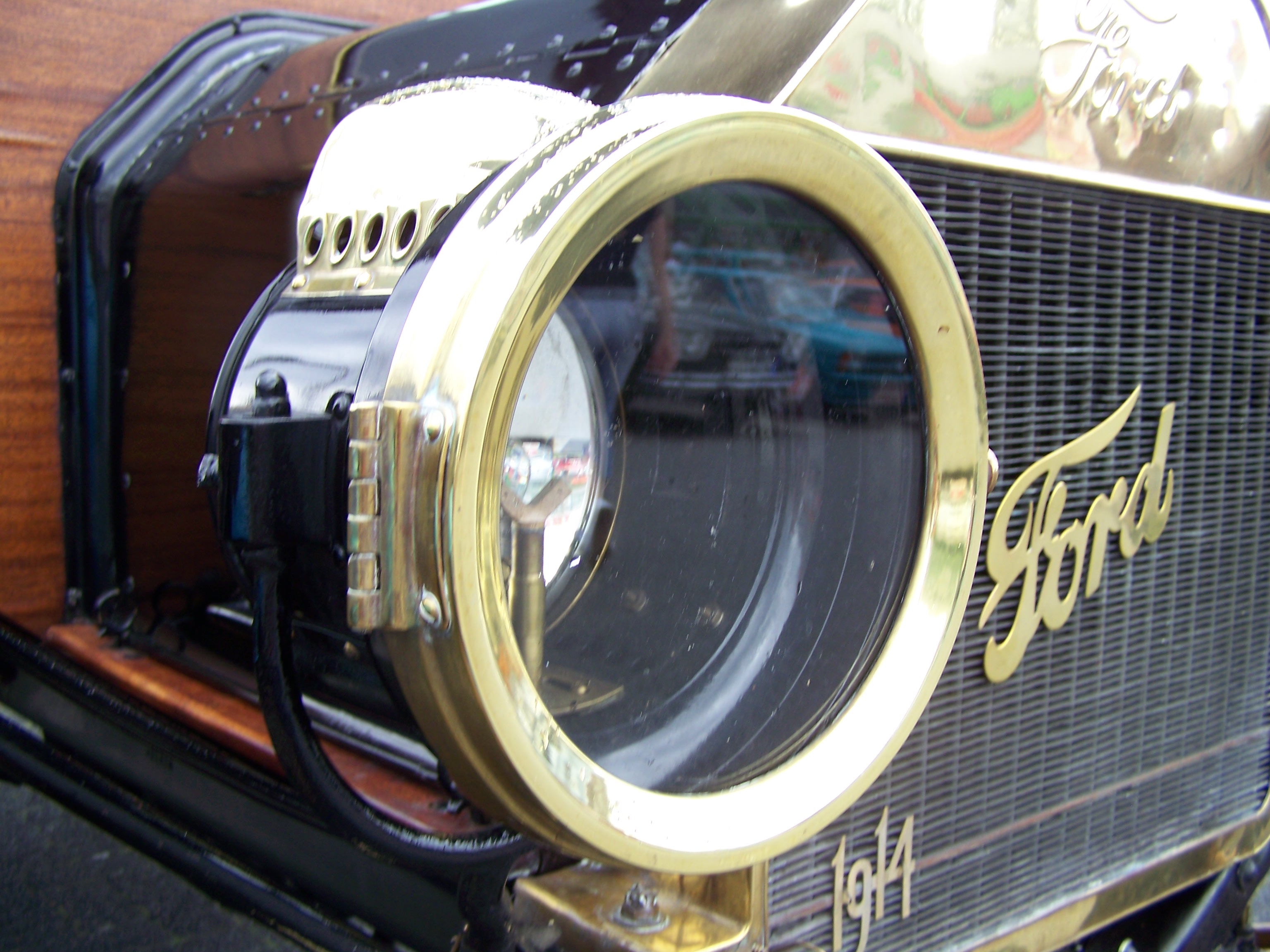 Detail Ford Modell T - 1914, in Herzogenrath